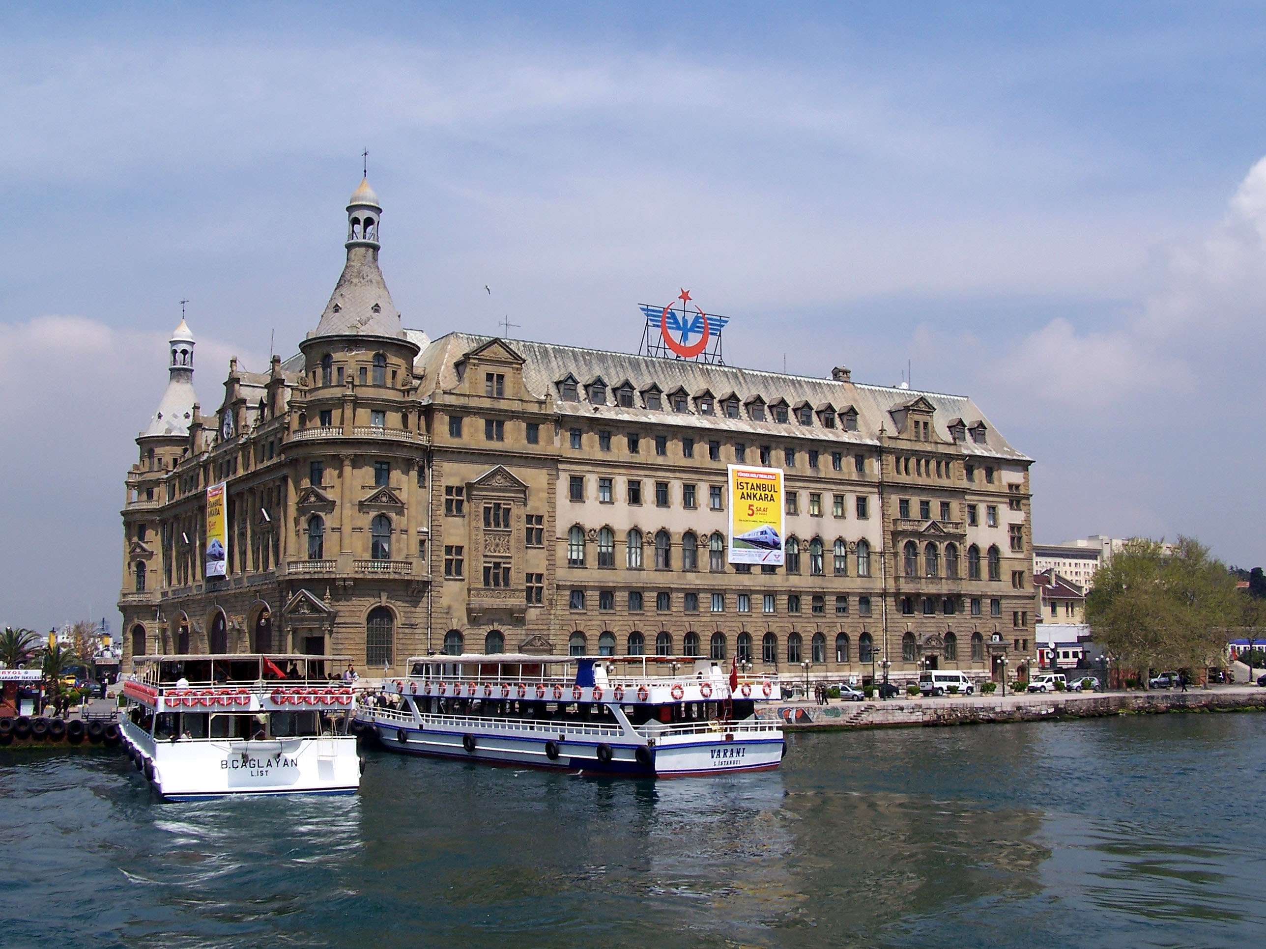 Haydarpaşa Garı in Kadıköy, İstanbul, Turkey